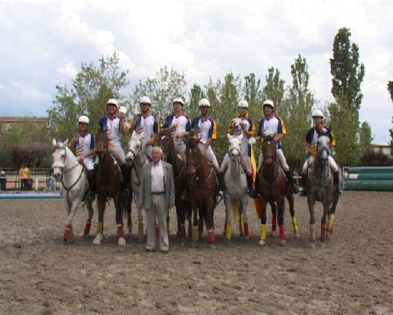 Miembros de la Seleccion catalana de Horseball, Campeones de España 2007.